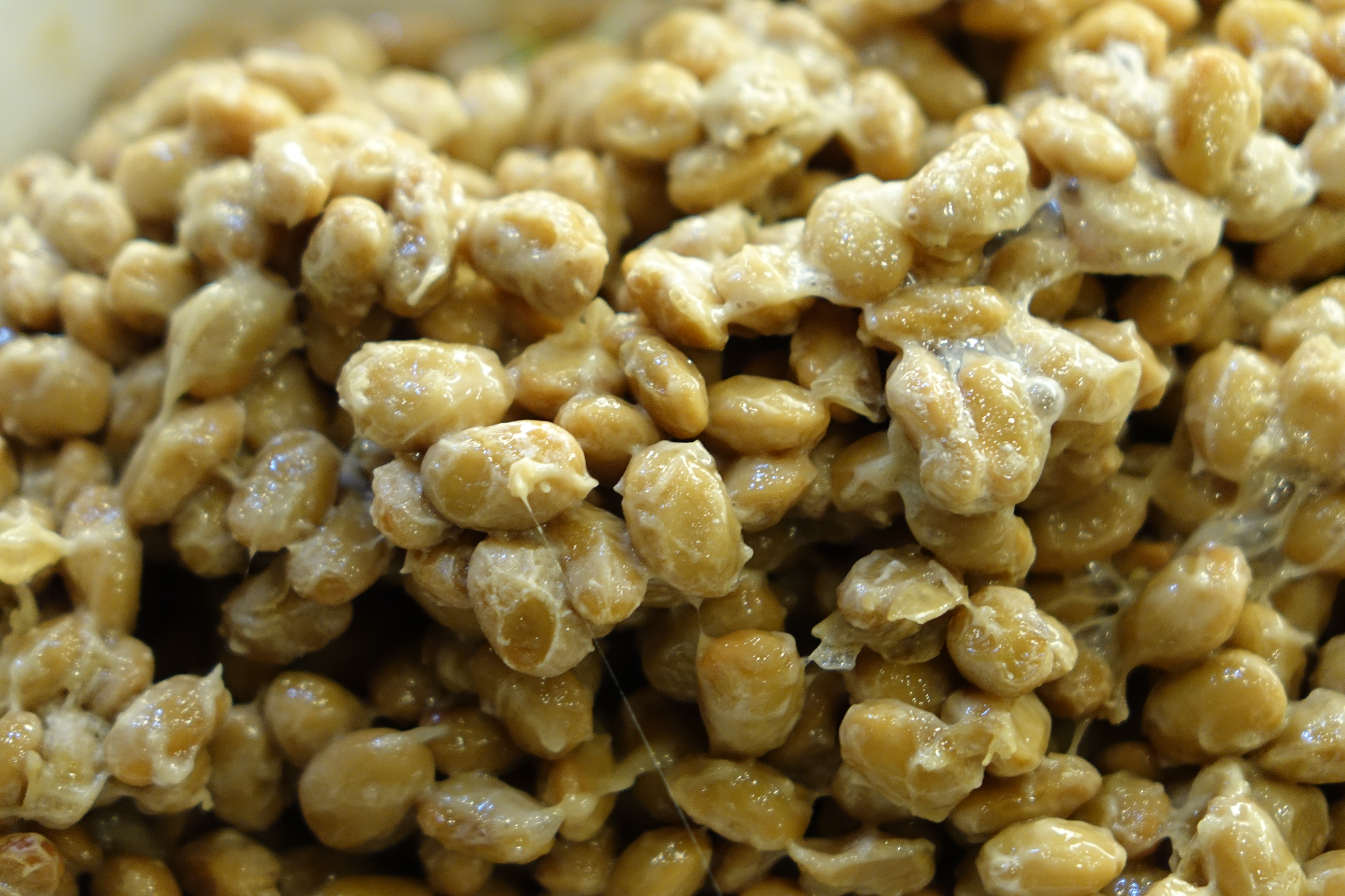 청국장, 2015년 2월 서울특별시 서초구 효소원 방배2호점